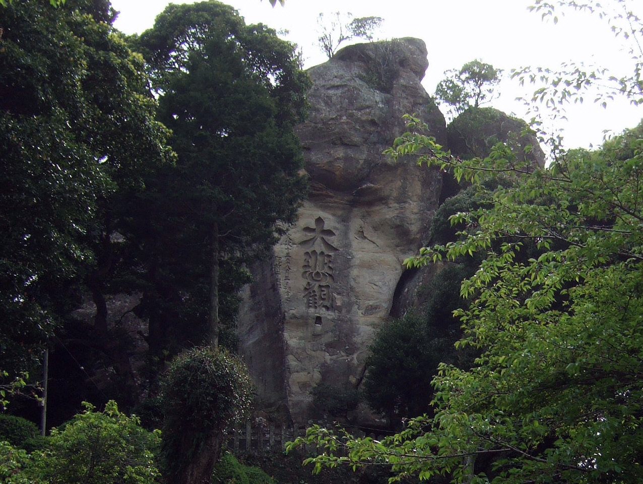 平戸八景・大悲観（佐世保市小佐々町） Hirado-Hakkei Daihikan（Kosaza Town,Sasebo City）